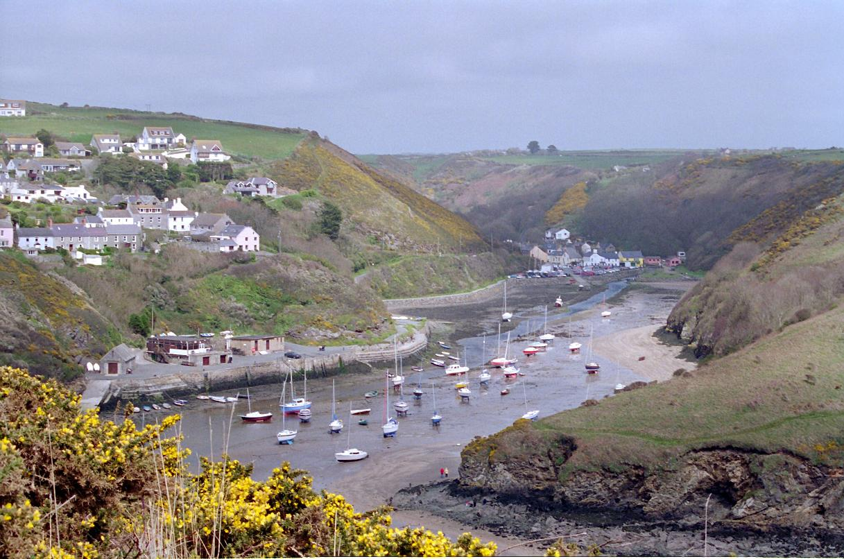 Solva Harbor